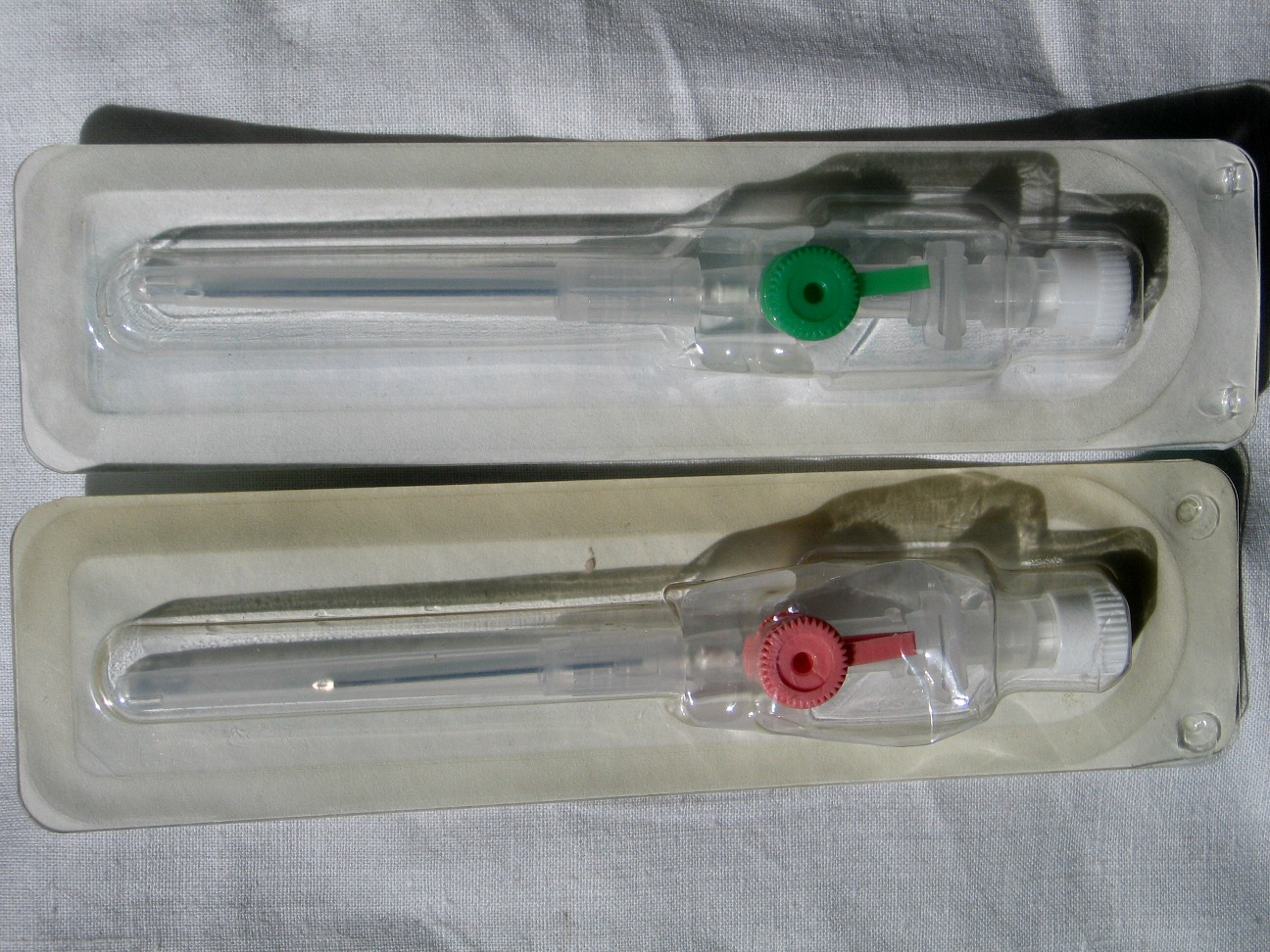 Wenflon